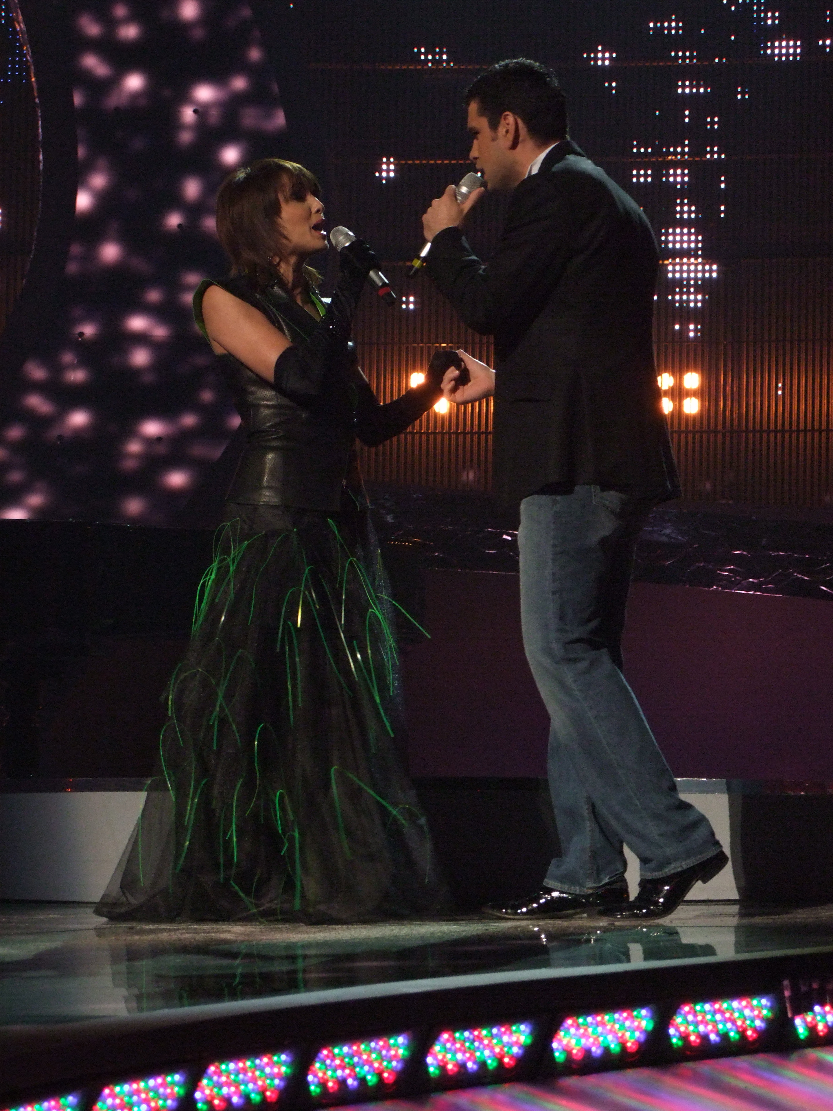 Eurovision Song Contest 2008, 1st semifinal Romania: Nico & Vlad - Pe-o margine de lume